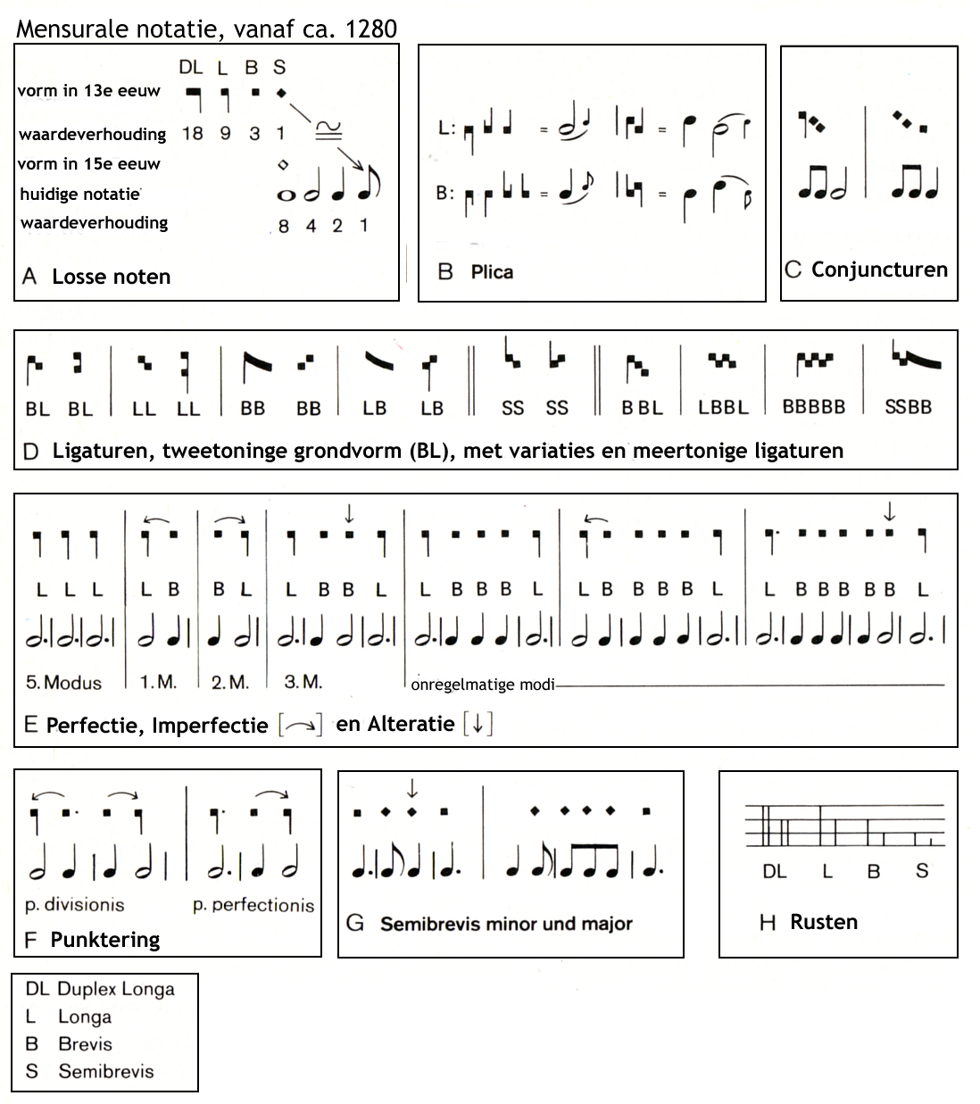 Mensurale notatie grafiek De waarde van de enkele noten en hun verhouding. De Brevis is de hoofdeenheid, ofwel de teleenheid ('Tempus'), de Brevis bevat normaliter 3 Semibrevis, de Longa heeft 3 Brevis, en de Duplex Longa heeft 3 Longa's.Het is een ternair systeem. De plica bestaat uit een korte streep aan een Longa of Brevis. Het is een op- of neergaande versiering, meest de helft in lengte van de hoofdnoot. Conjuncties zijn combinaties van Semibrevis, die als sneel noten van de hoofdnoot worden afgetrokken. De korte noten staan steeds voor de lange. Ligaturen zijn verbindingen tussen verschillende tonen, die oorspronkelijk op 1 lettergreep werden gezongen. Perfectie en imperfectie. Zie de hoofdregels in het artikel. De punt (zie ook 'Punctus' in het artikel) achter een noot geeft een verandering van de 'perfectie' weer. De Semibrevis van 1 tel heet 'minor', de tweetellige Semibrevis heet 'major'. Notatie van rusten geschiedt door verticale streepjes, waarbij de lengte aangeeft hoelang de rust duurt en hoe perfect die wordt.